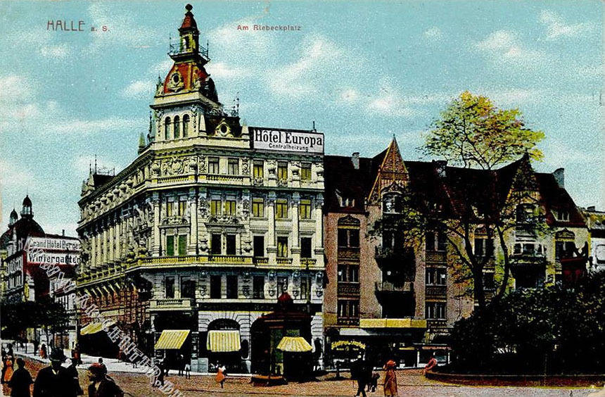 Halle, Riebeckplatz